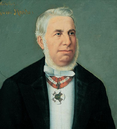 Andrea Aradas (1810-1882) - Zoologo